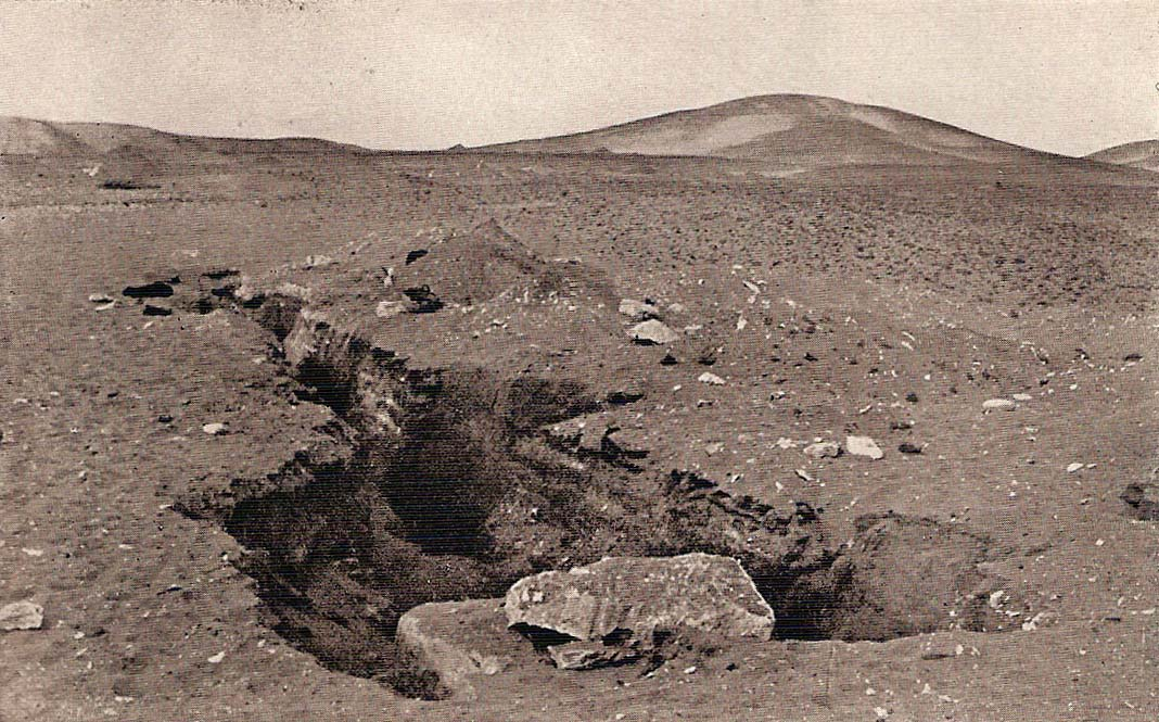 Vue de la tranchée de la pyramide sud de Mazghouna